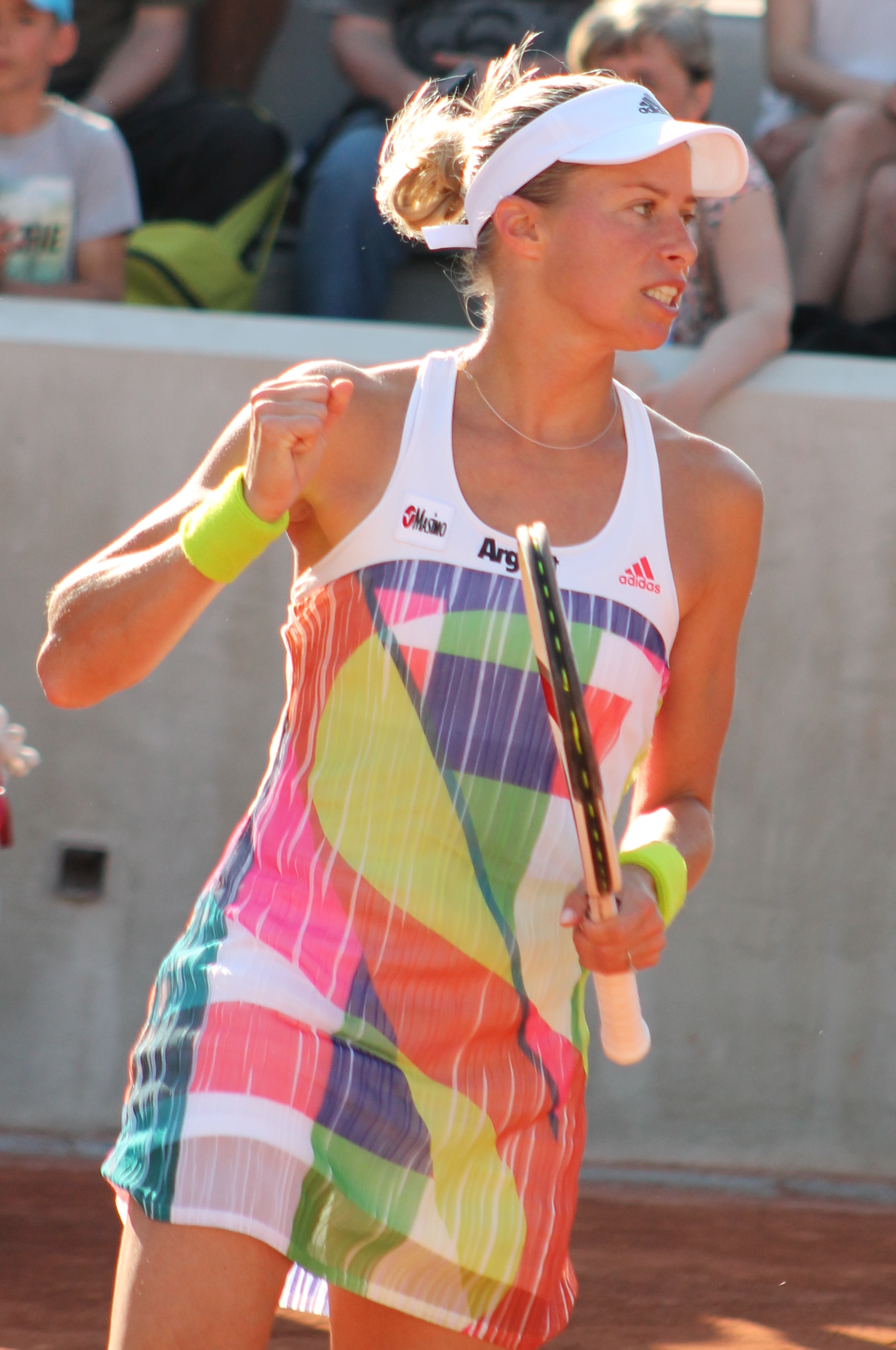 Hlavackova RG16 (1)